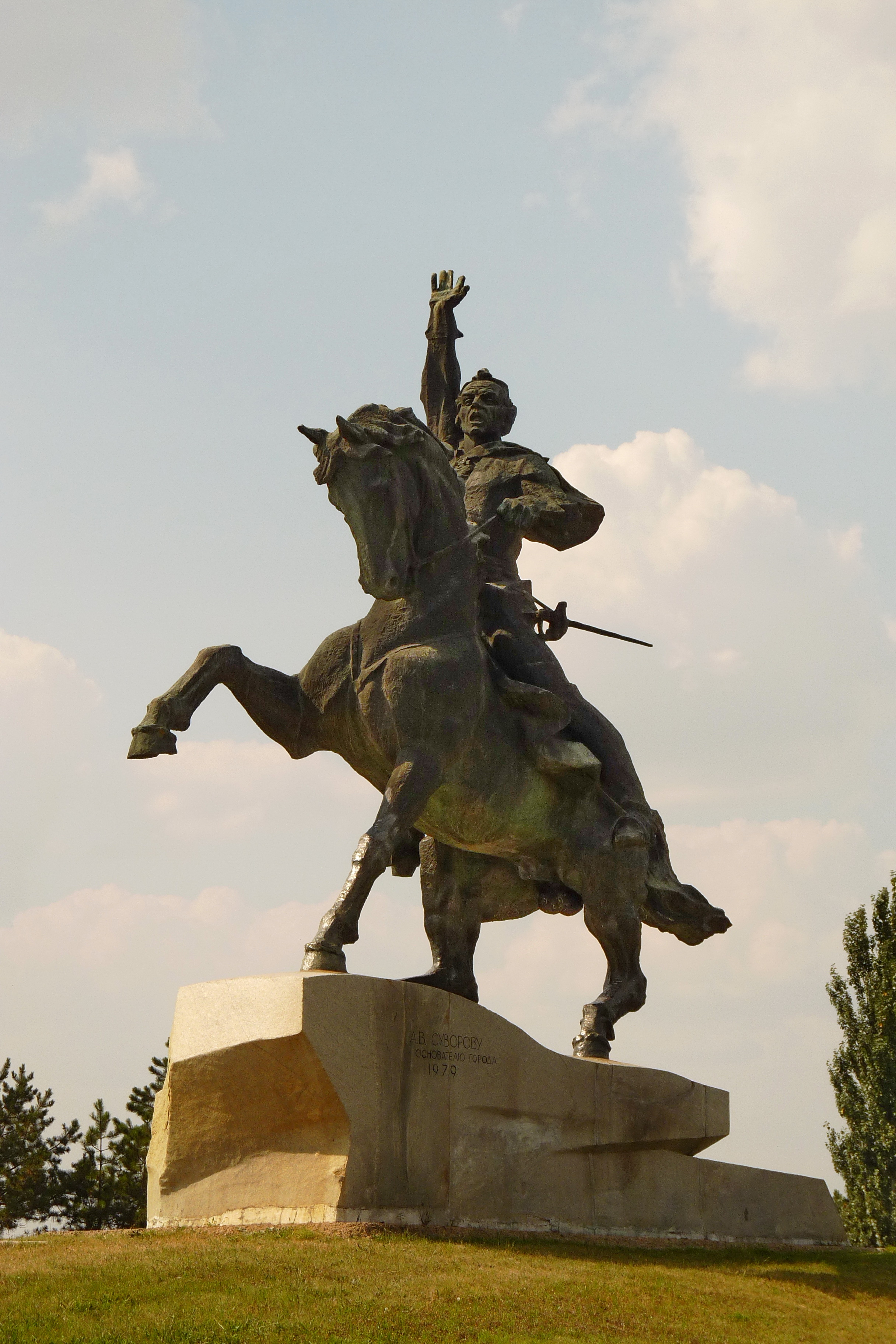 Monument to Suvorov